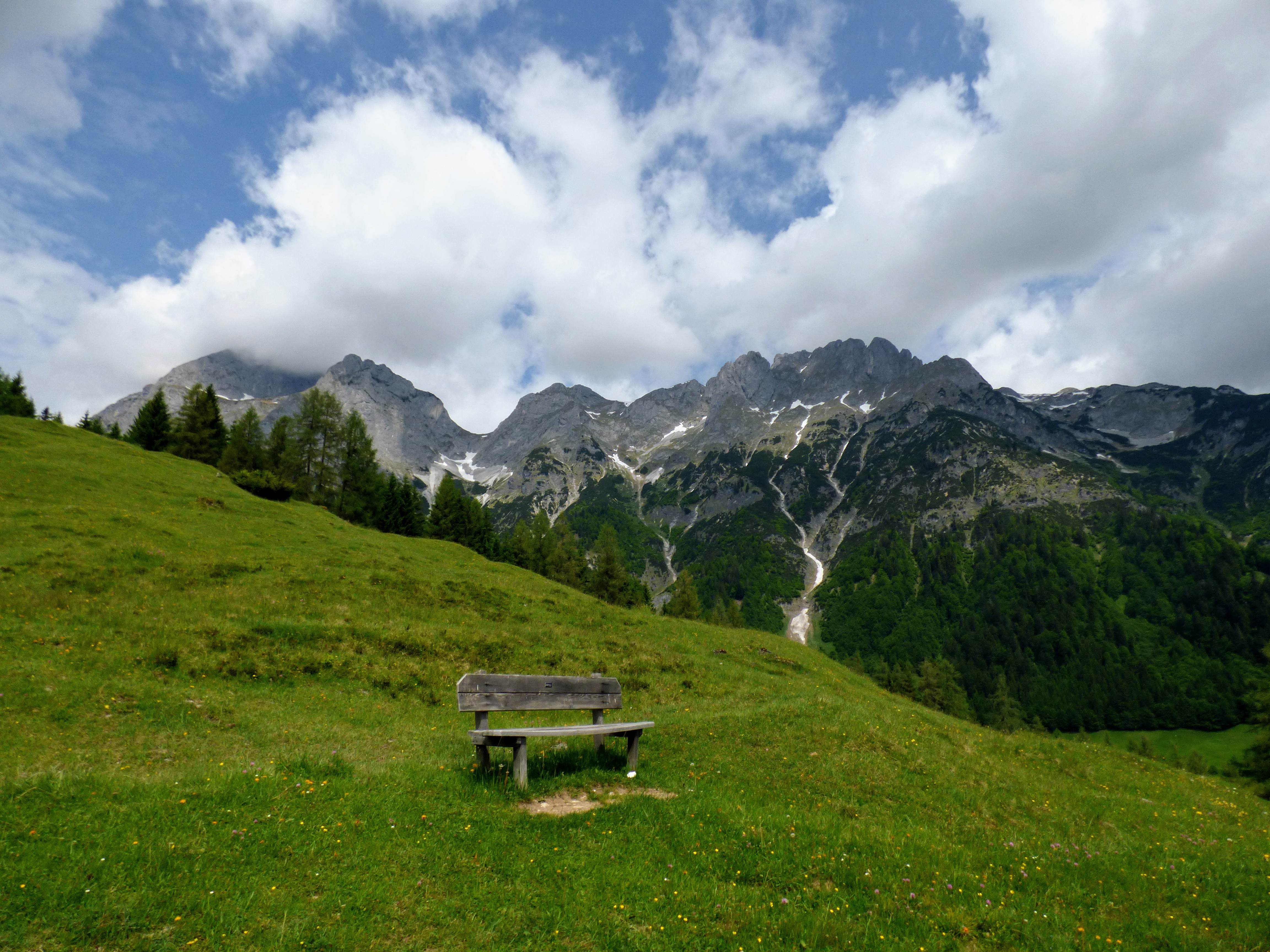 Wanderweg im Lammertal, Gemeinde St. Martin am Tennengebirge. im Hintergrund: Tennengebirge